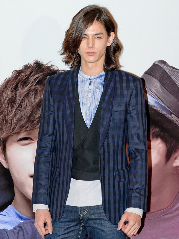 tvN 드라마 '닥치고 꽃미남밴드' 제작발표회